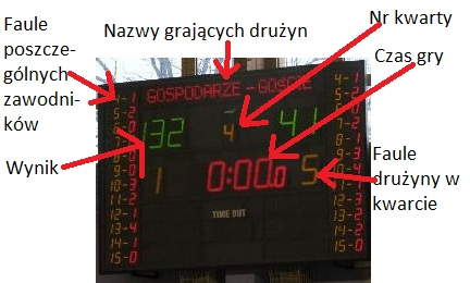 Tablica wyników z opisem